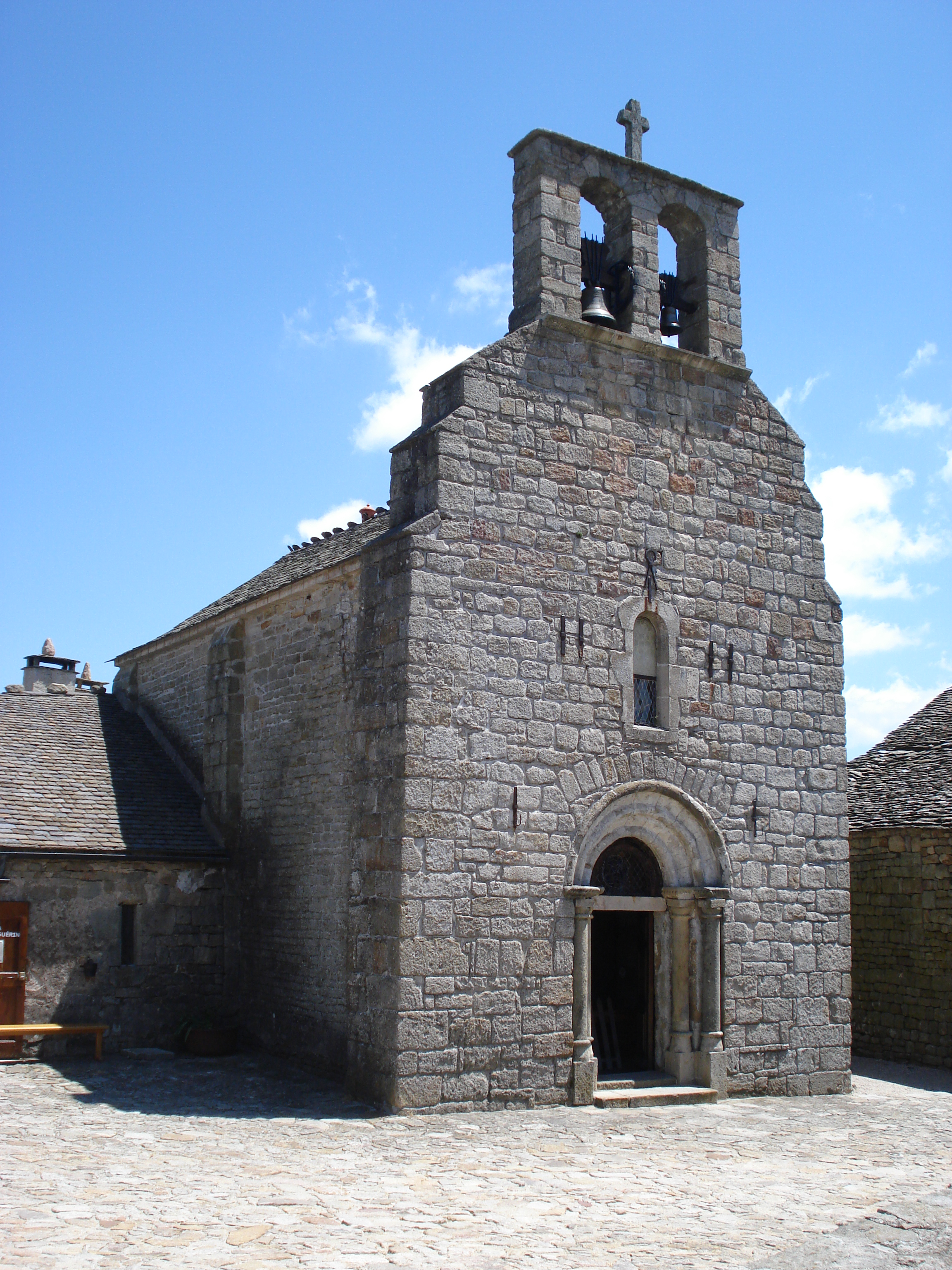 La Garde-Guérin (Prévenchères, Lozère, Fr), église, façade et clocher-mur.